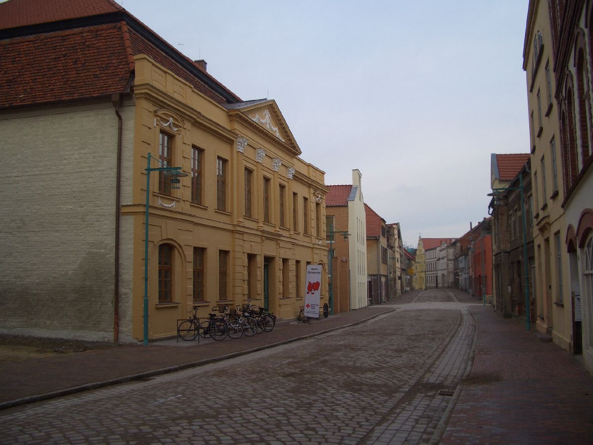 Lange Straße, Güstrow (Mecklenburg-Vorpommern). Links im Bild die Alte Schule (Hausnummer 41)